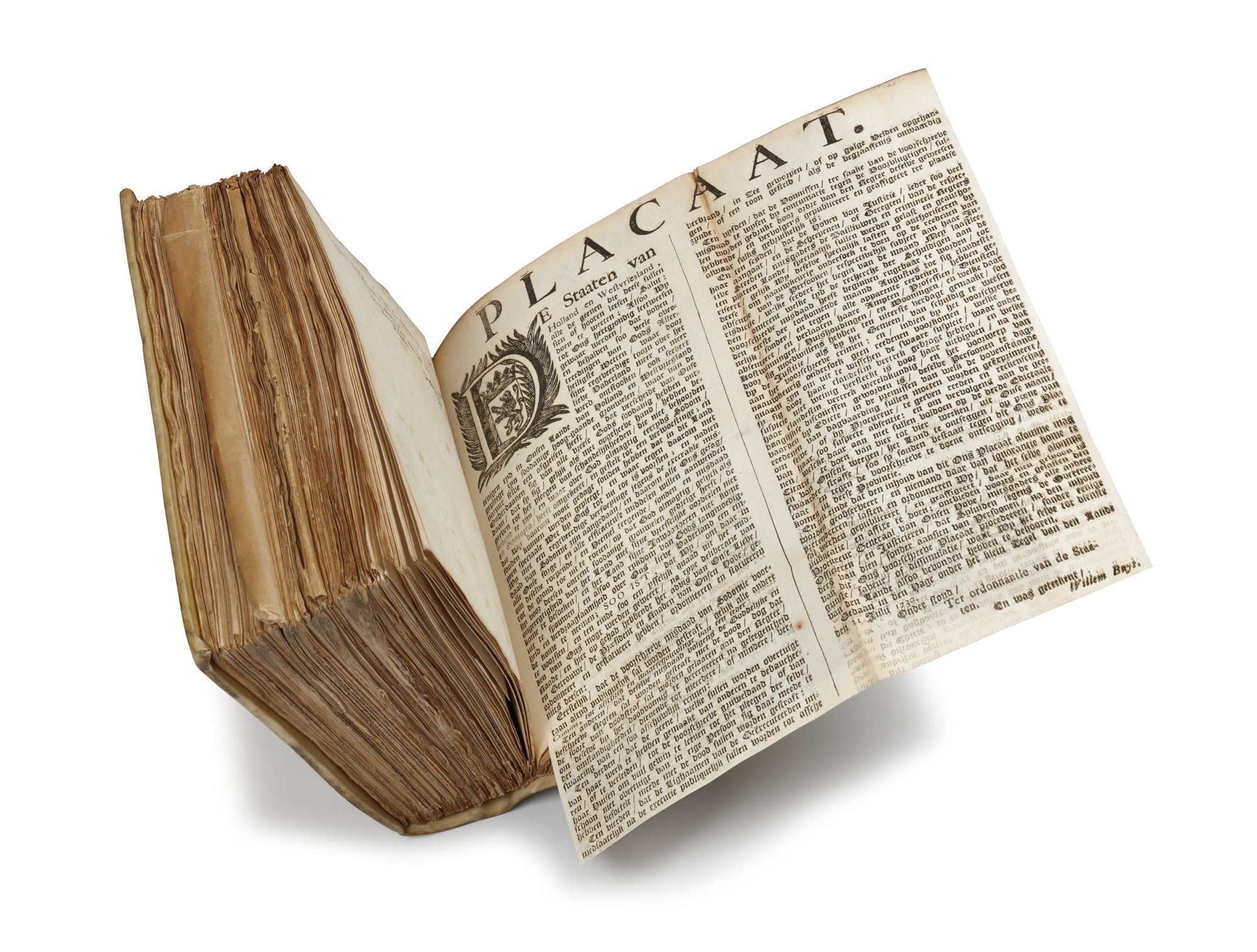 Verbod op homoseksualiteit Staten-Generaal, inventarisnummer 12189